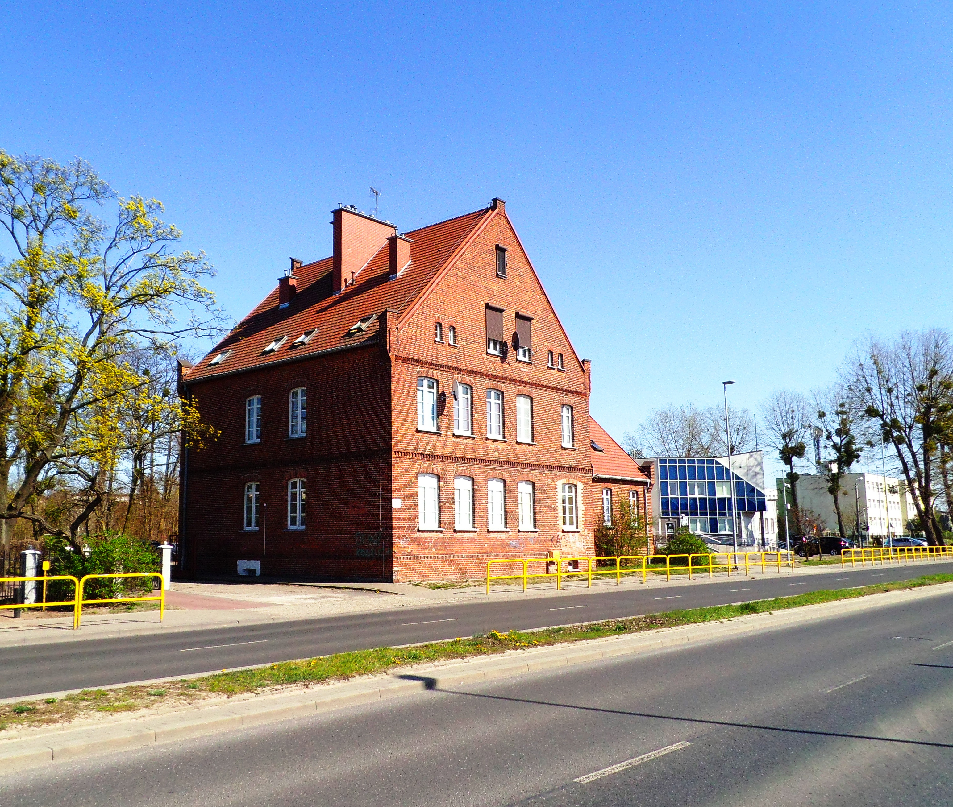 Dawna Szkoła Podstawowa nr 9 w Toruniu1